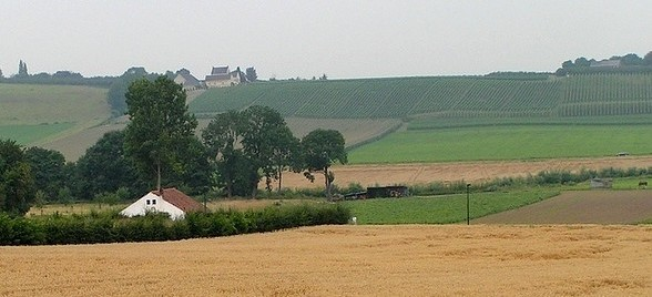 Jekerdal met wijngaarden